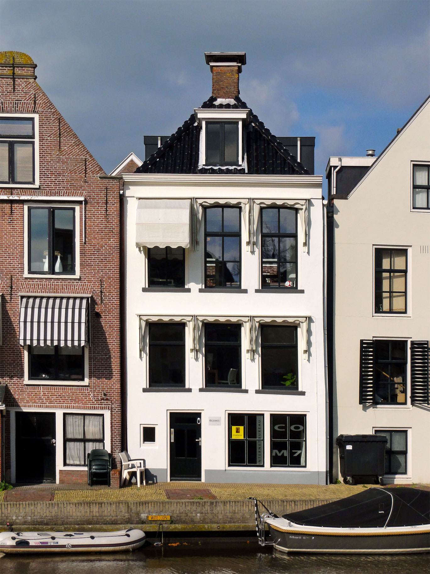 Achtergevel Nauwstraat 3 Dokkum, rijksmonument